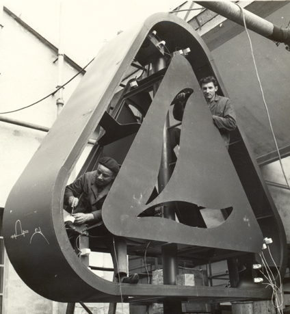 Lavori alla nuova insegna della Lombardini, che verrà montata sulla torre dell’acquedotto nello stabilimento di Pieve.